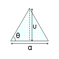 Ισόπλευρο τρίγωνο